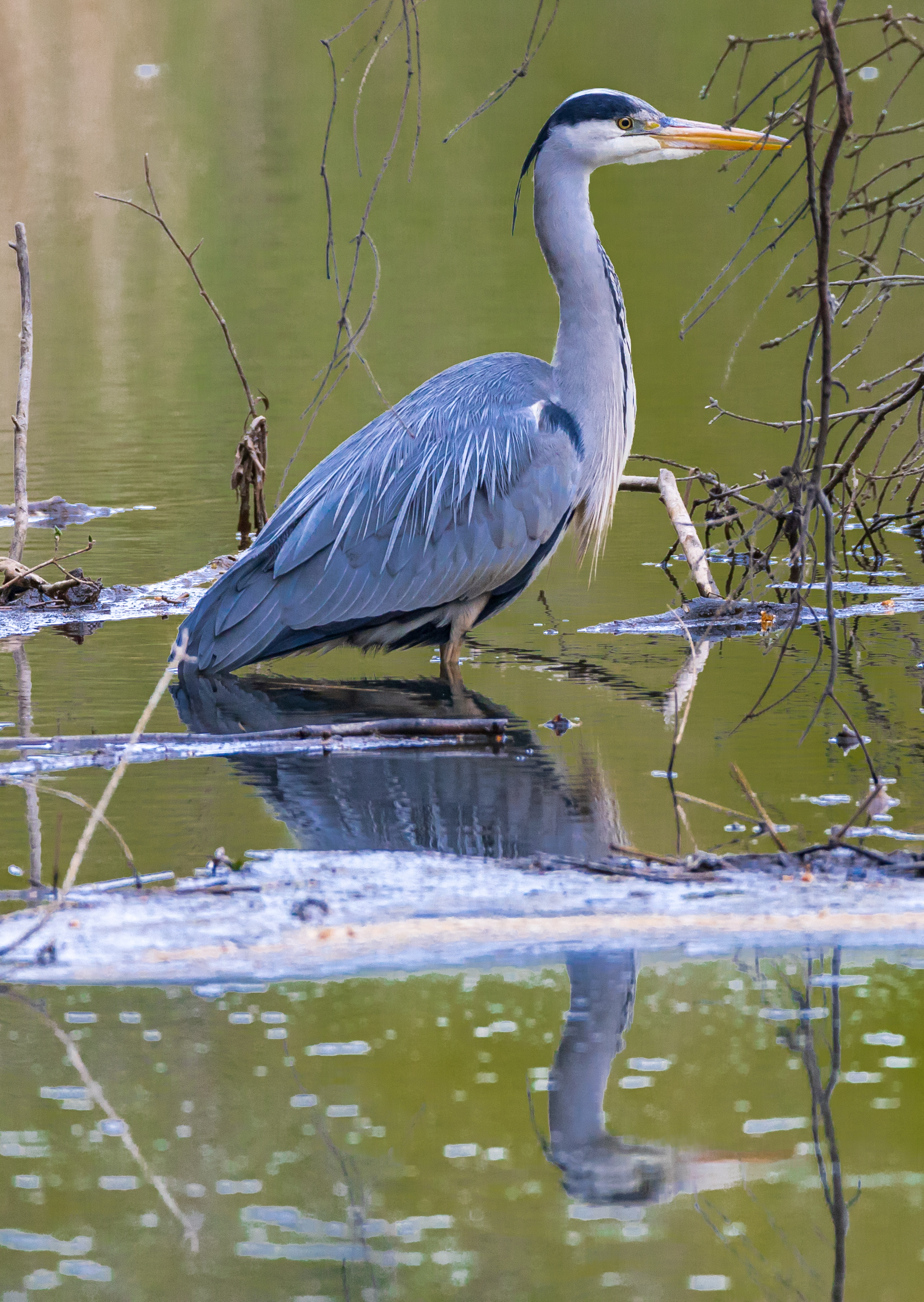 Ein Graureiher im Landschaftsschutzgebiet Drachensee, Russee Und Umgebung